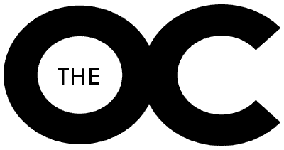 Logo de la série Newport Beach.